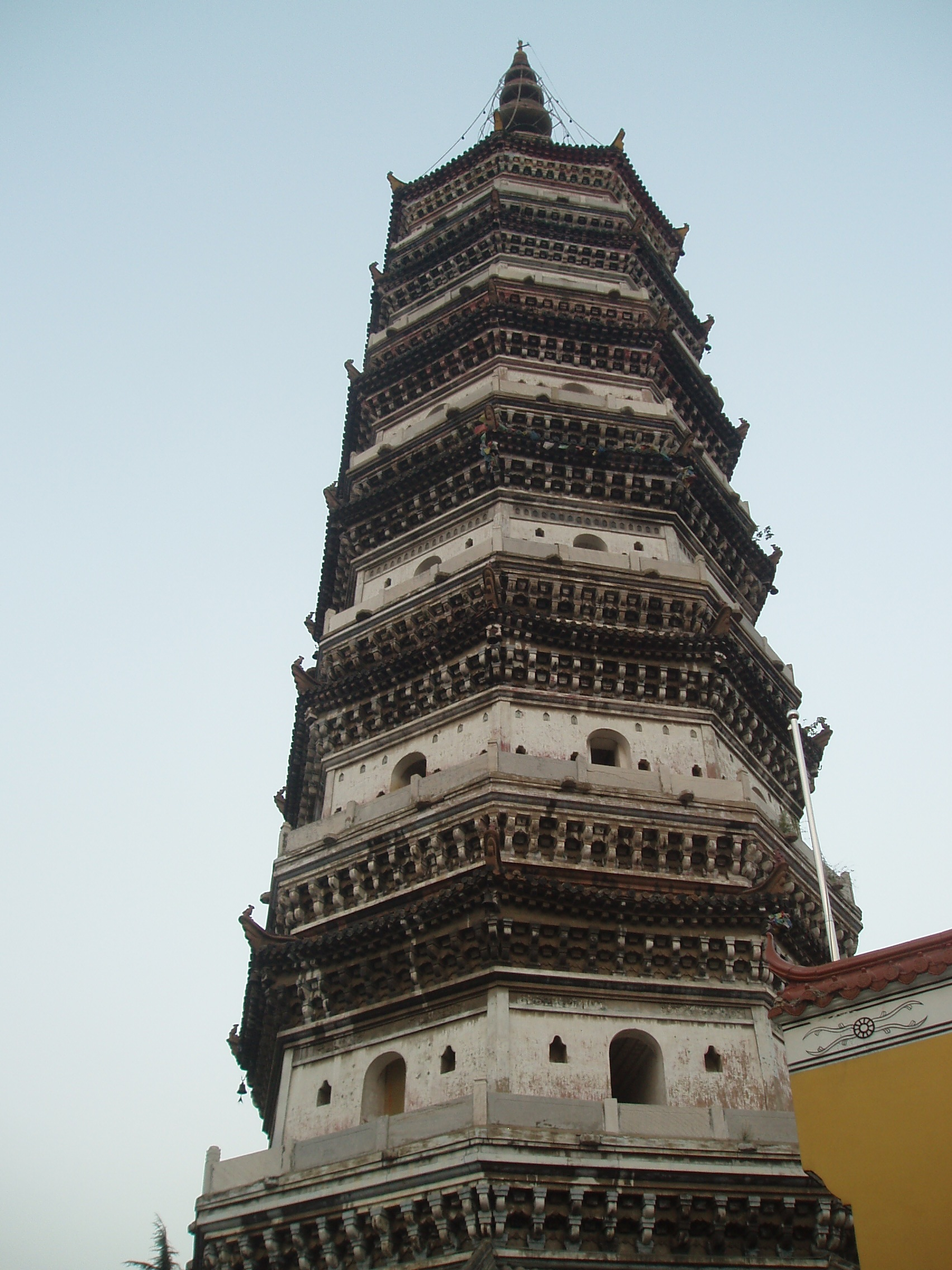 The Zhenfeng Pagoda in Anqing, Anhui, China